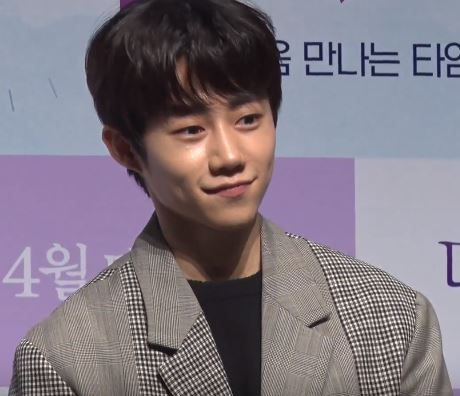 영화 '다시, 봄' 제작보고회가 5일 오전 서울 강남구 CGV압구정에서 열렸다. 이날 행사에는 배우 이청아, 홍종현, 박경혜, 박지빈 그리고 정용주 감독이 참석했다.